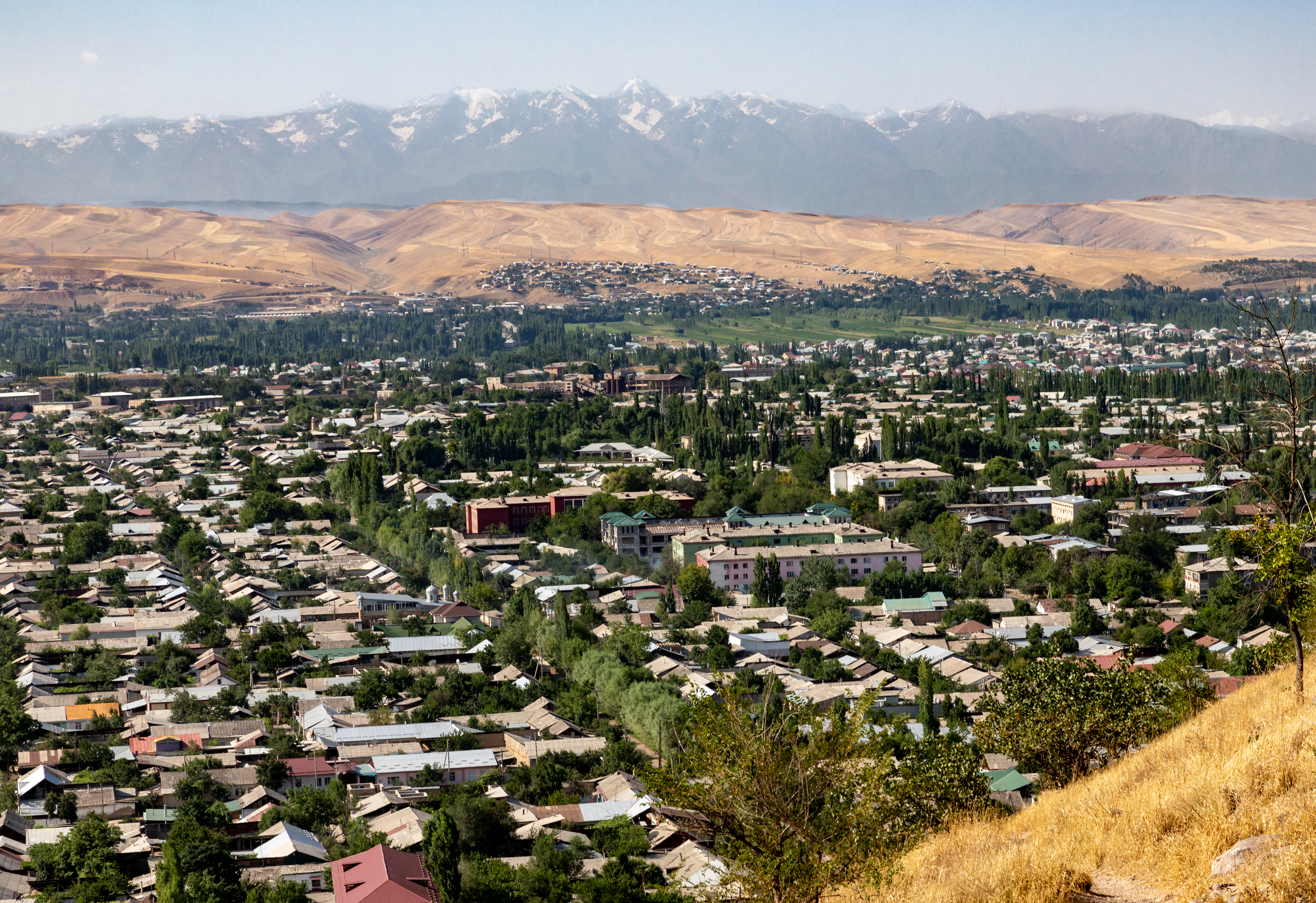 Sulayman Mountain, Osh